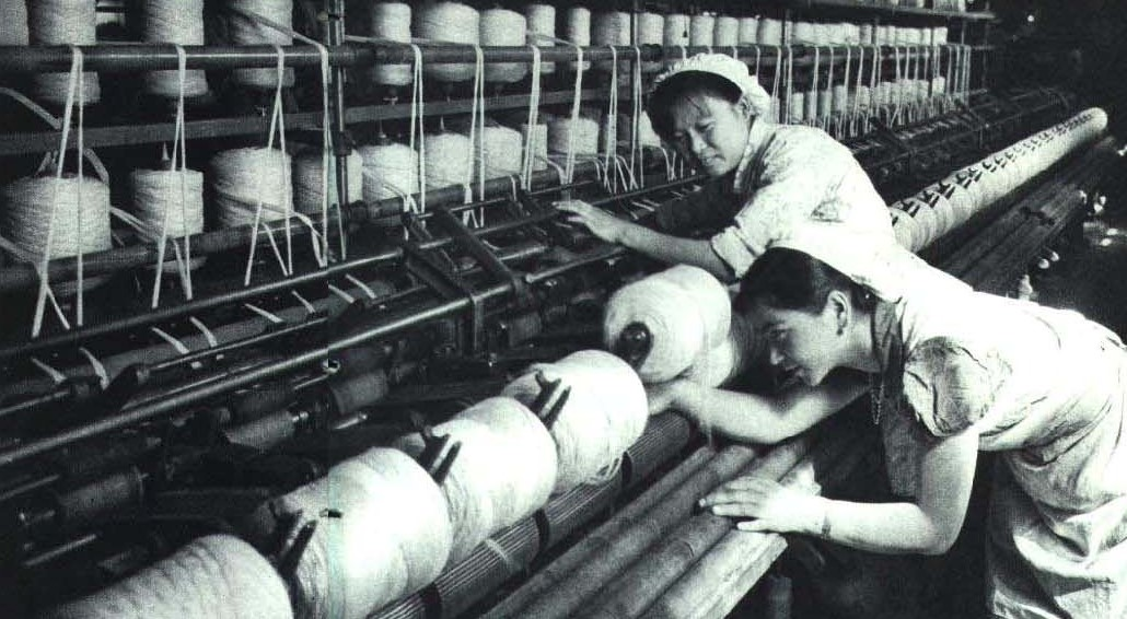 1964-03 1964年 伊宁毛纺厂